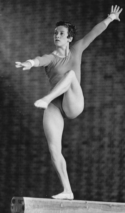 Karin Hannewitz Zentralbild Kohls Ks-Zi 24.6.1964 DDR-Aufgebot für Olympia-Ausscheidungen. Für die Olympia-Ausscheidungen mit den Turnerinnen Westdeutschlands am 27. und 28. Juni 1964 in Wolfsburg, sowie am 18. und 19. Juli 1964 in Schwerin hat der Deutsche Turnverband der DDR folgende Aktive nominiert: Erika Barth, Ute Starke (beide SC Leipzig), Birgit Radochla, Ingrid Föst, Rosemarie Heritz, Karin Hannewitz, Brigitte Sax (alle SC Dynamo Berlin), Christel Felgner und Barbara Stolz (beide SC Chemie Halle). UBz: Karin Hannewitz auf dem Schwebebalken. (Studré)